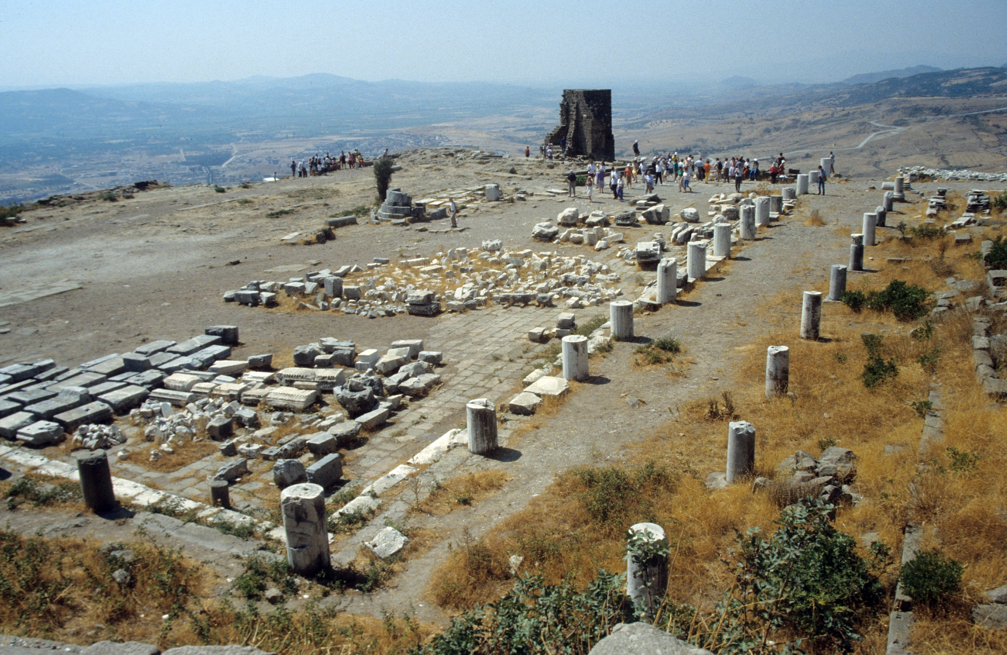 Pergamon, Westtürkei, Athena-Heiligtum